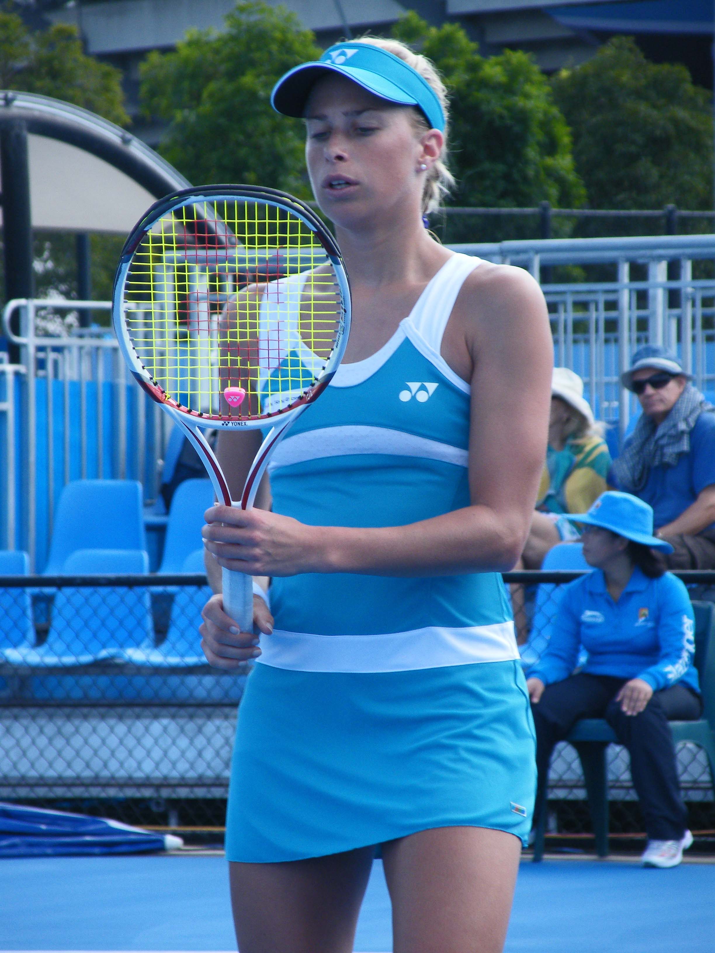 Andrea hlaváčková